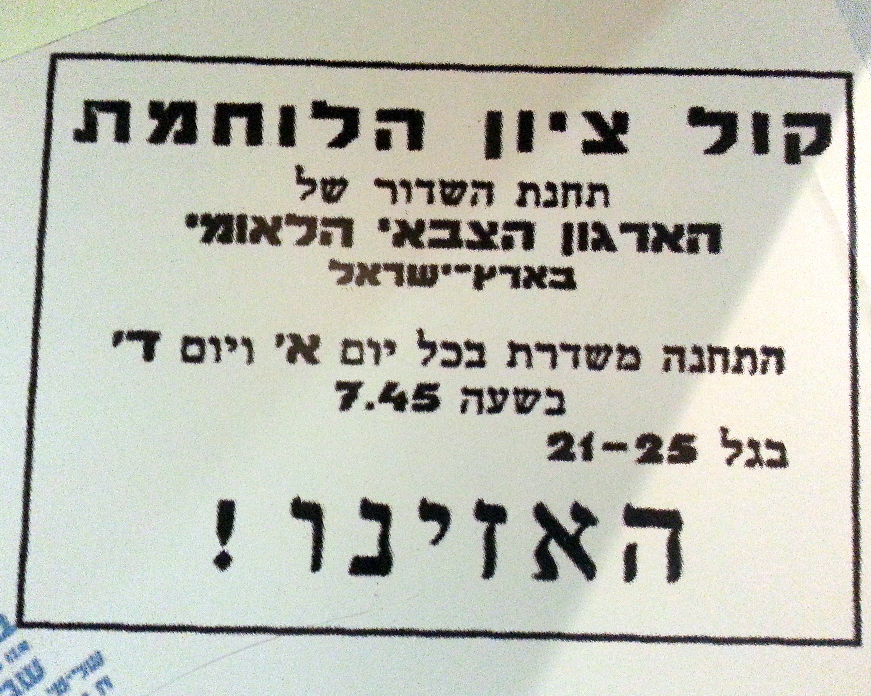 צילום של כרוז תעמולה של האצ"ל, מוצג במכון ז'בוטינסקי בתל אביב